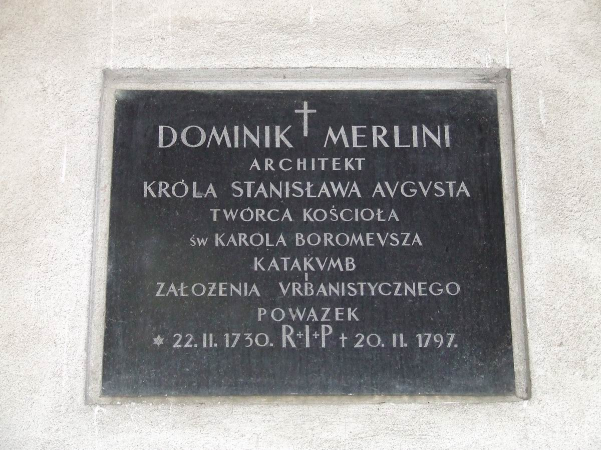 Dominik Merlini, grób w katakumbach, Stare Powązki